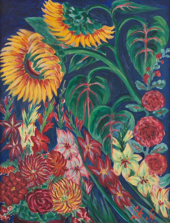 Stanislaus Stückgold zur Zeit ohne Titel, ohne weitere Angaben